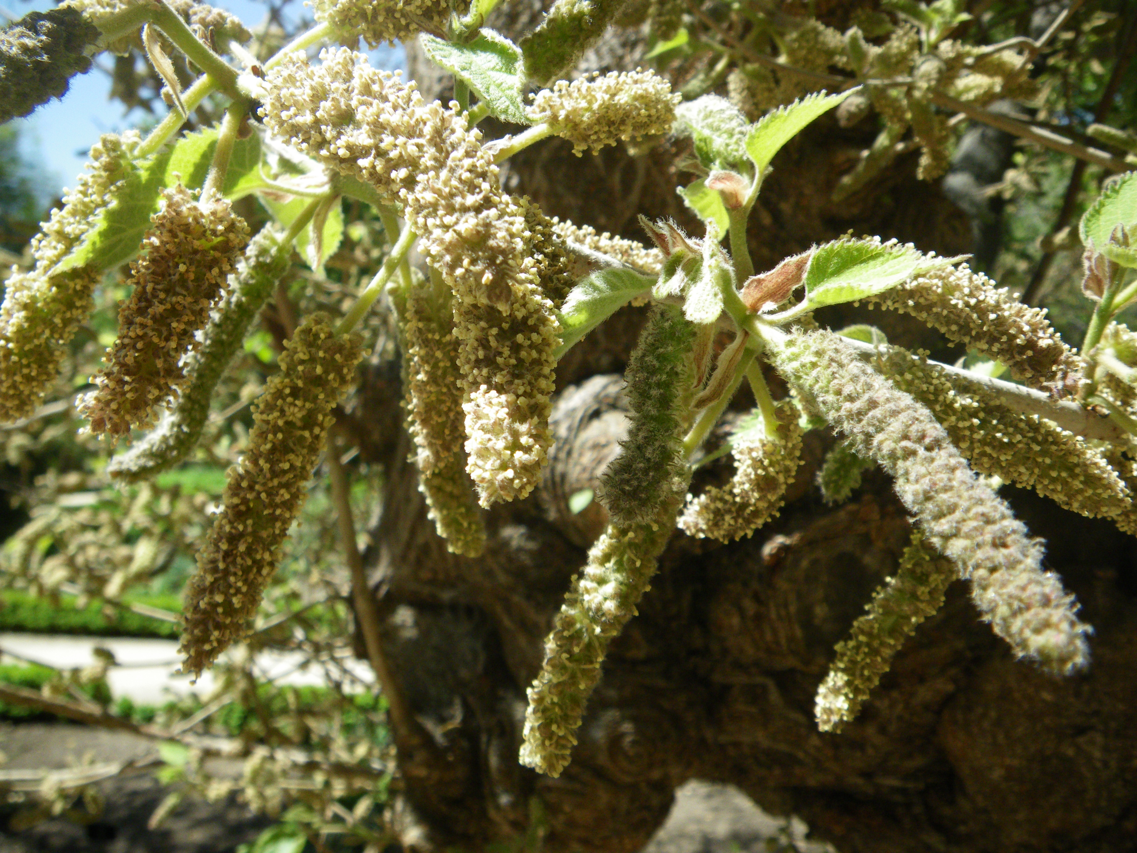 Broussonetia papyrifera, flores masculinas. Real Jardín Botánico, Madrid, España.